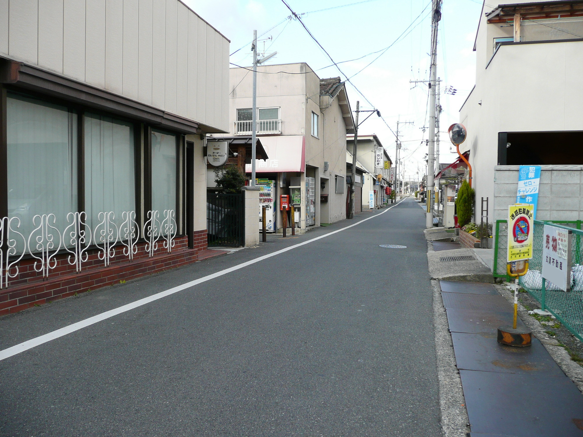 Kinki Nippon Railway,Ikoma Line,Tatsutagawa Station. /近鉄生駒線駅竜田川駅・駅前通り（北側）。画像中ほどに駅入口がある。